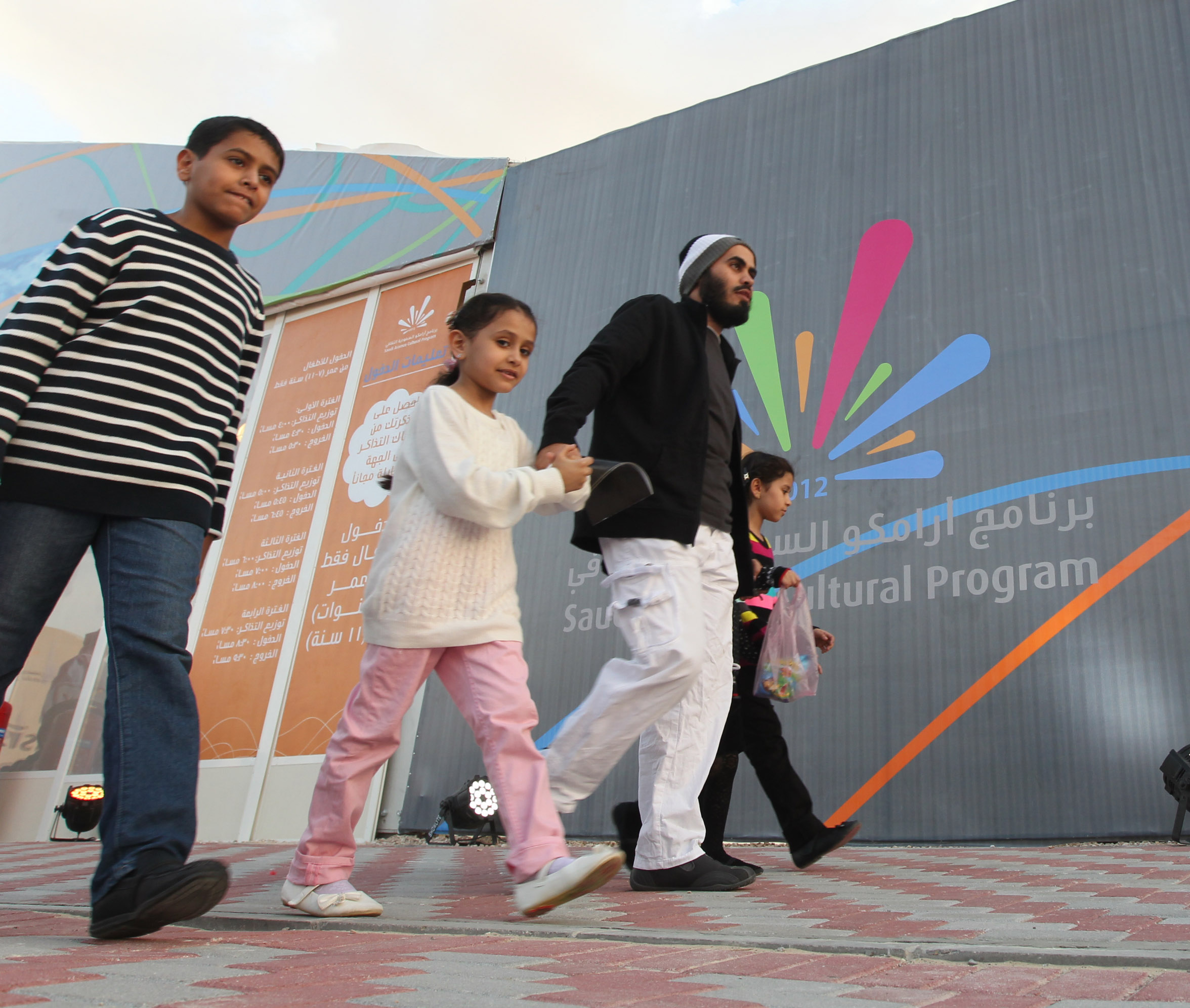 لقطة لفعاليات في برنامج أرامكو السعودية الثقافي 2012